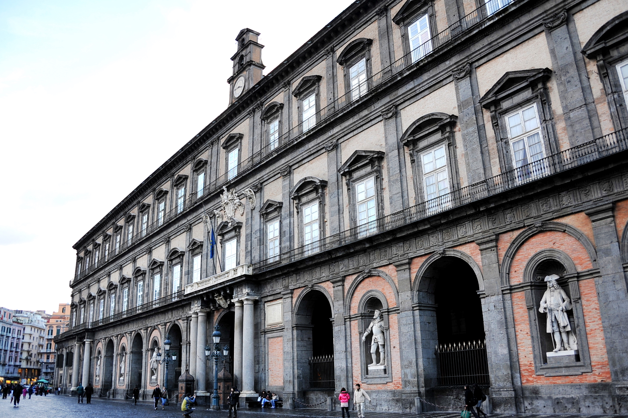 Palazzo Reale di Napoli